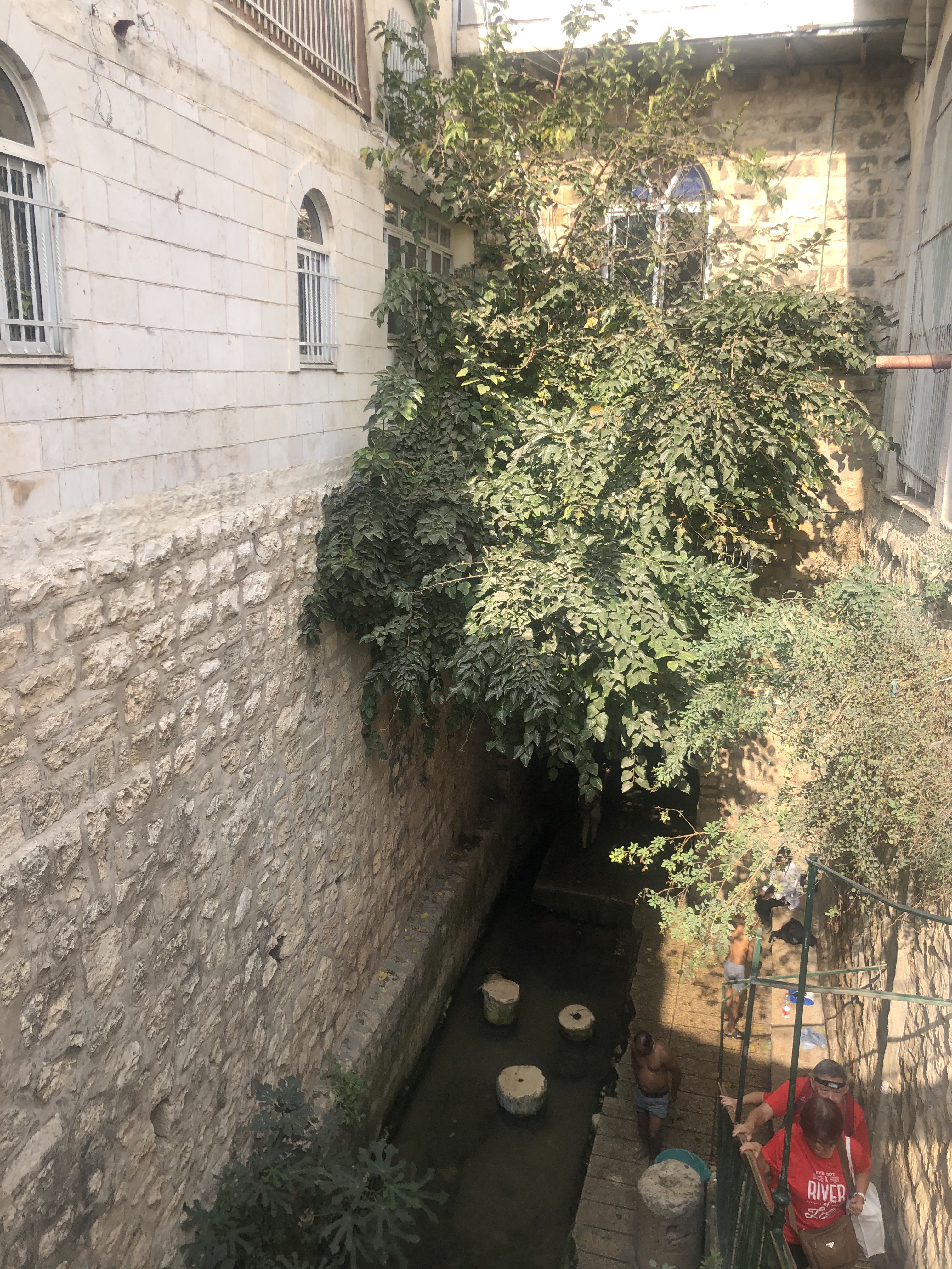 عين سلوان في بلدة سلوان في القدس